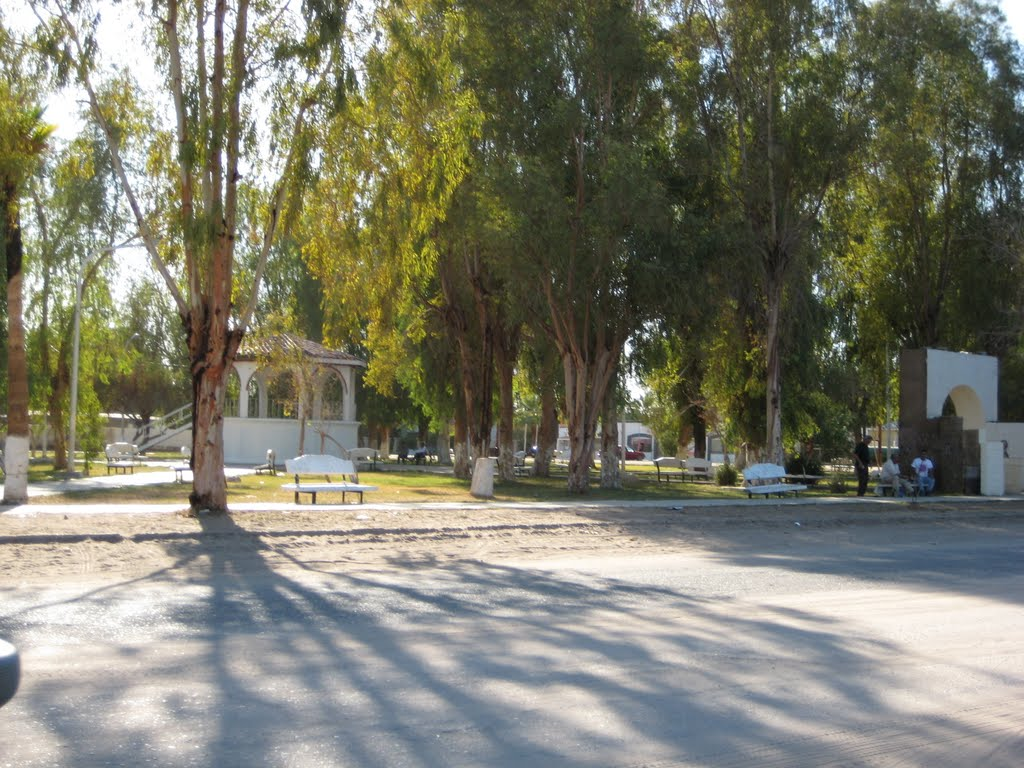 Parque Oficial del Poblado Benito Juarez Tecolotes